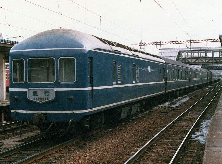 国鉄20系客車 カヤ21 急行「天の川」